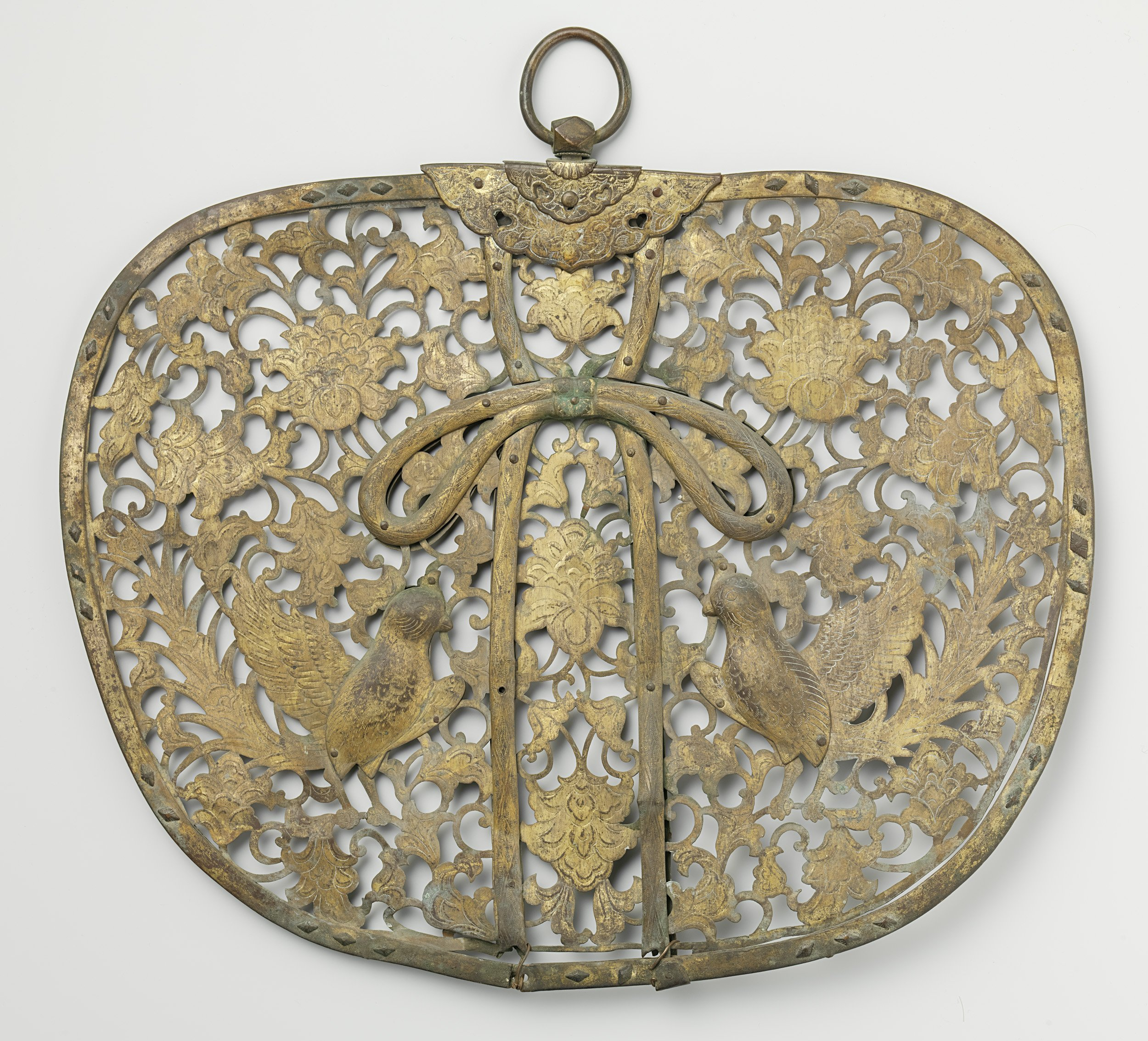 Versiering om in een tempel op te hangen: ajour-decoratie met bloemen en planten. Afkomstig uit Shiga, Azuchimura, Jogon-tempel. Label Line: anoniem, 1200 - 1300, brons